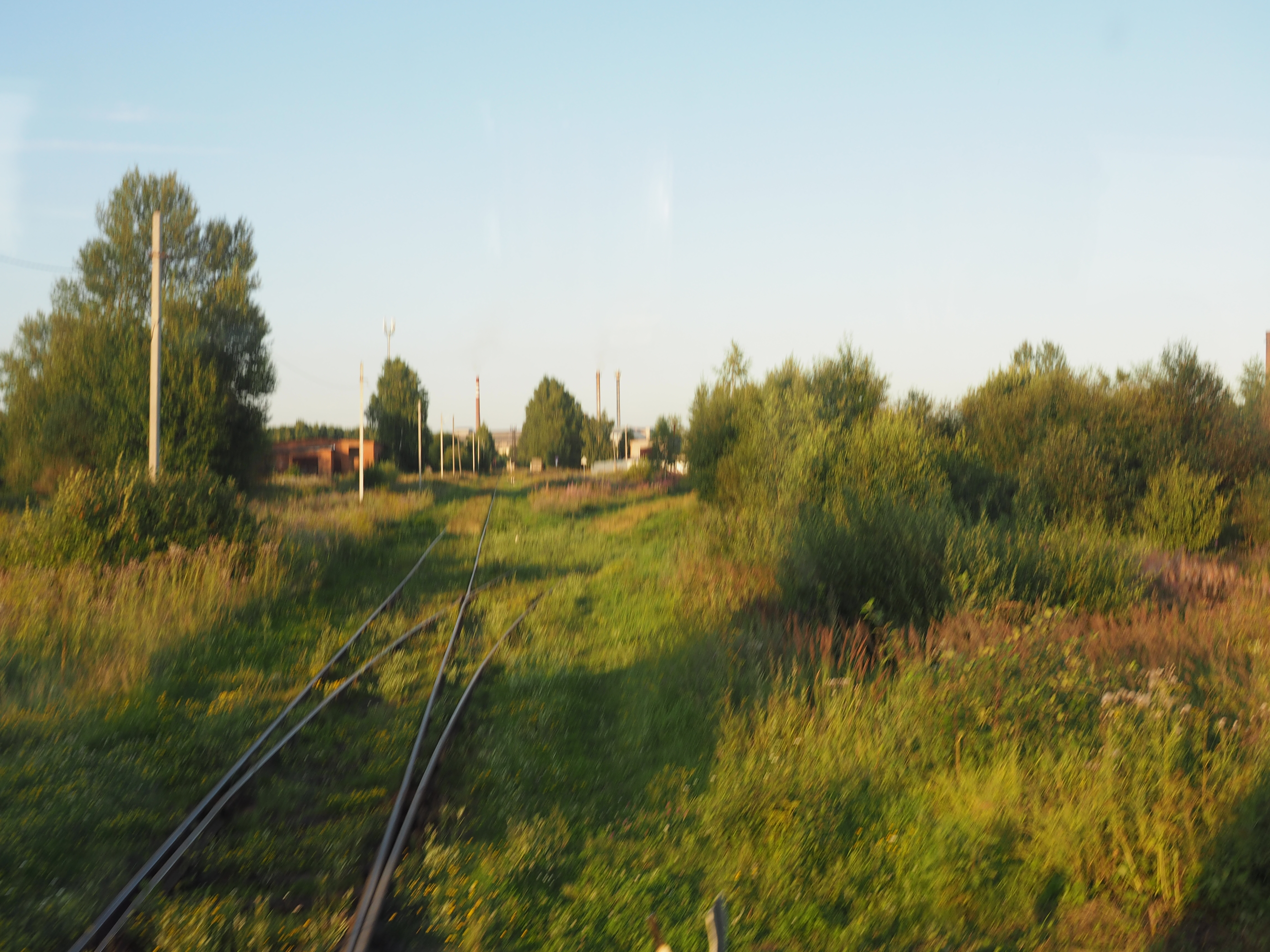 Chagoda, Vologda Oblast, Russia